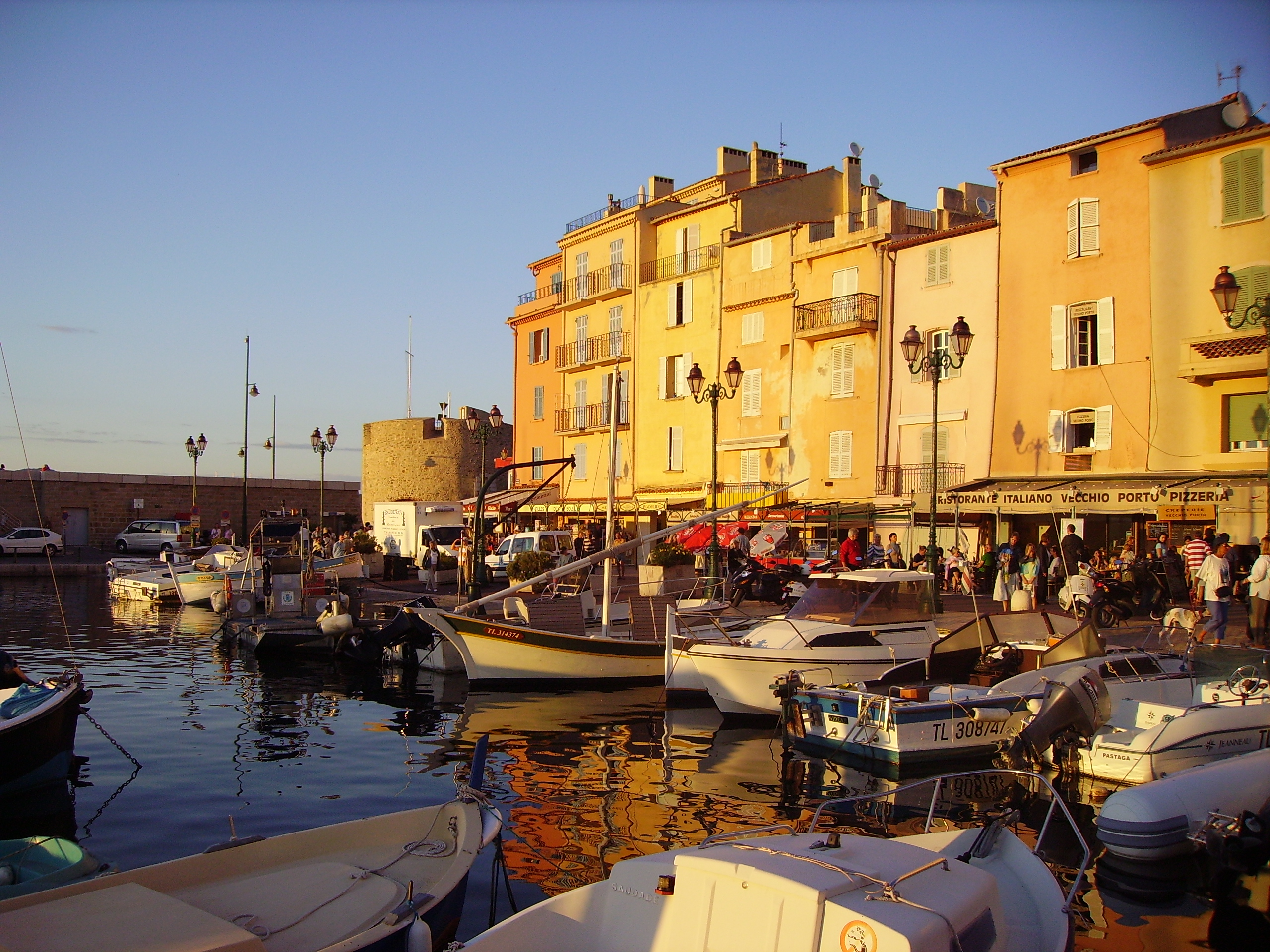 Δειλινό στο λιμάνι του Σαιν-Τροπέ. Ido: L'olda portuo di Saint-Tropez.